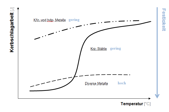 Schematische Darstellung der Kerbschlagarbeit von Metallen mit unterschiedlicher Gitterstruktur in Abhängigkeit von der Temperatur und Festigkeit. Kubisch-flächen-zentrierte und hexagonal-dichtest-gepackte Metalle mit geringer Festigkeit findet man in der Hochlage mit einer hohen Kerbschlagarbeit. Im Gegenzug dazu besitzen Werkstoffe mit einer hohen Festigkeit eine geringe Kerbschlagarbeit und befinden sich in der Tieflage. Werkstoffe mit einem Übergang aus der Hoch- in die Tieflage, weisen Mischbrüche im Bereich des Steilabfalss auf, und sich Stähle mit einem kubisch-raum-zentrierten Gitterstruktur mit einer geringen Festigkeit.